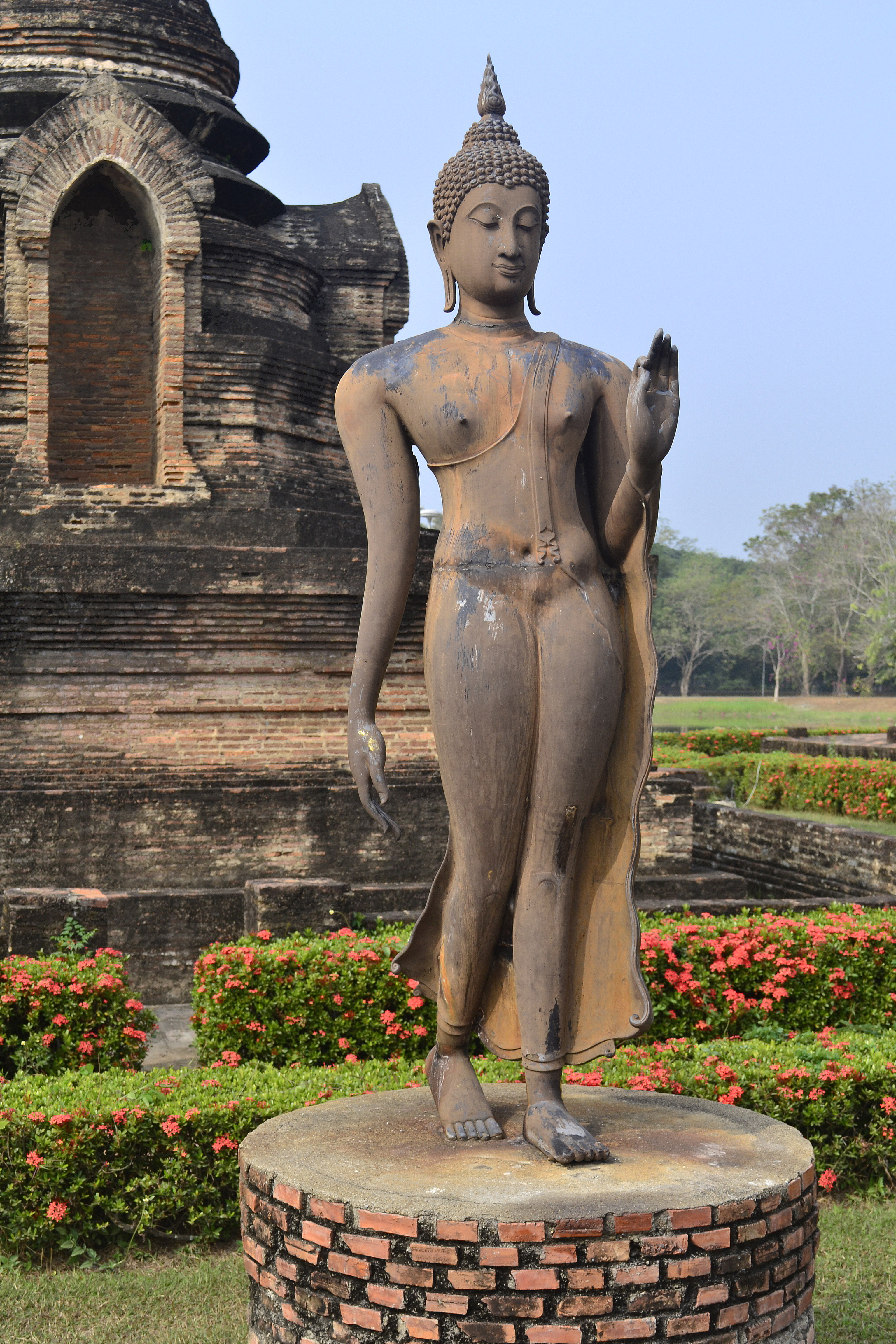 Buddhafigur am Nebenchedi des Wat Sa Si im Geschichtspark Sukhothai